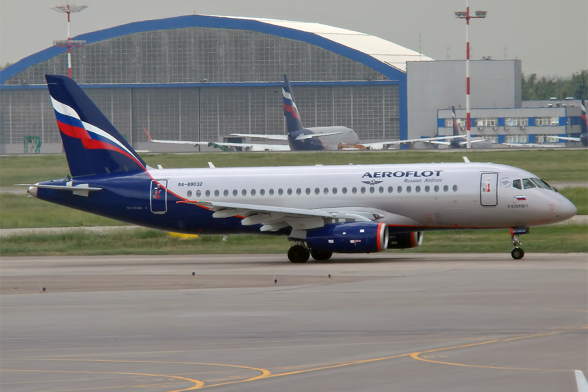 Aeroflot, RA-89032, Sukhoi Superjet 100-95B